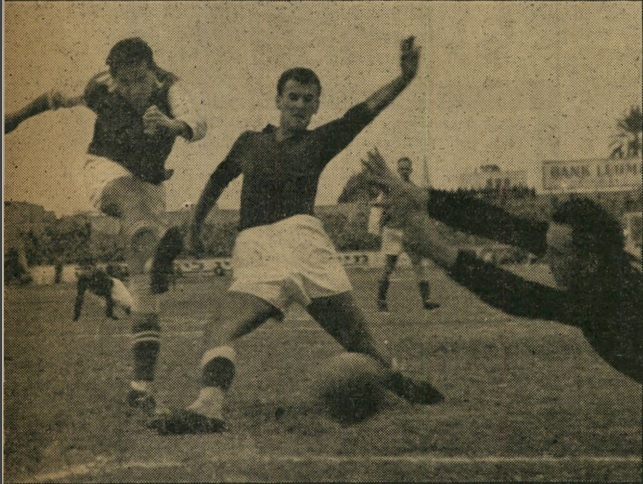 שייע גלזר מבקיע שער מול השוער היוגוסלבי וידניץ' של קבוצת ראדניצקי